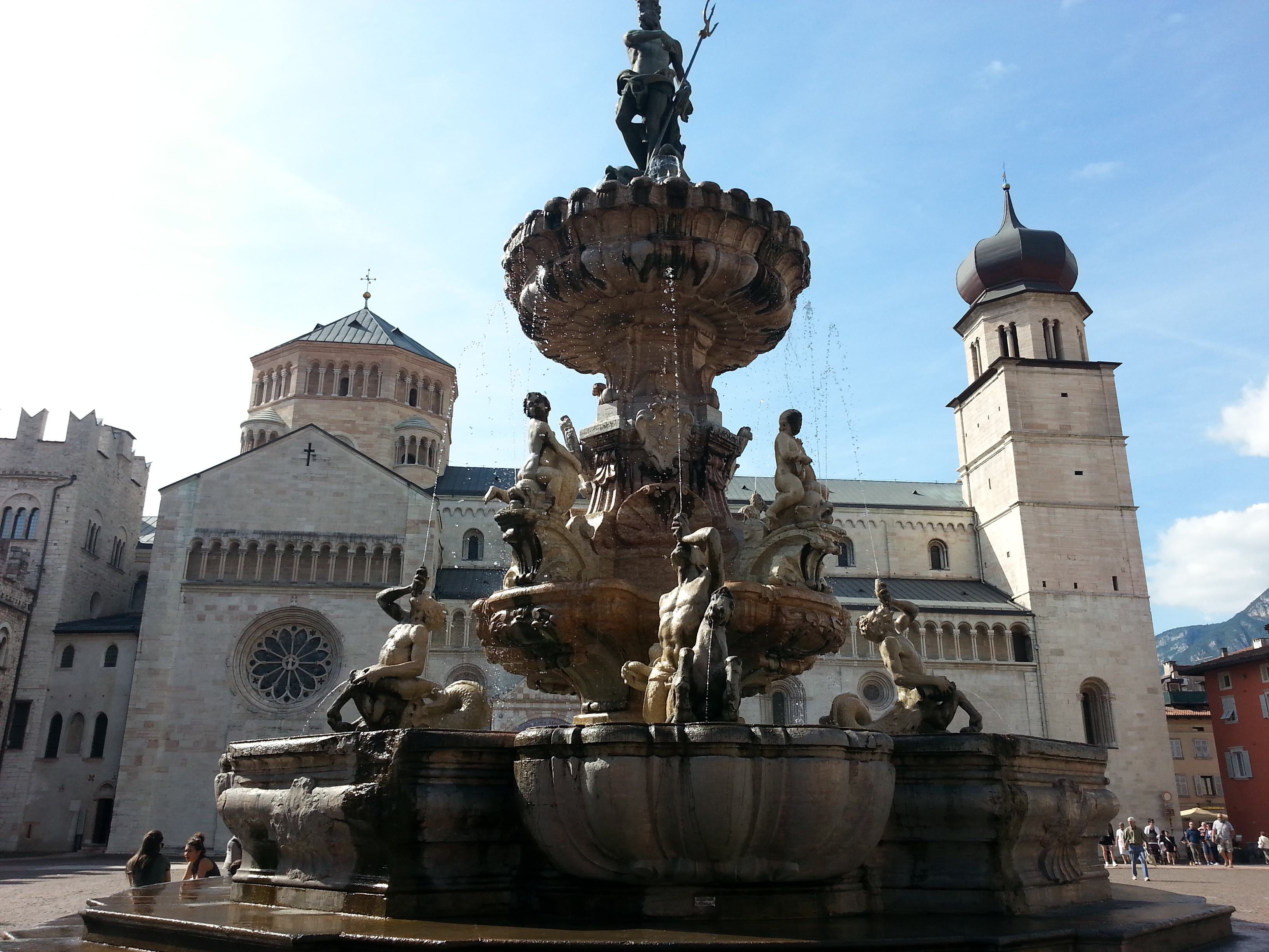 Fontana del Nettuno This is a photo of a monument which is part of cultural heritage of Italy.